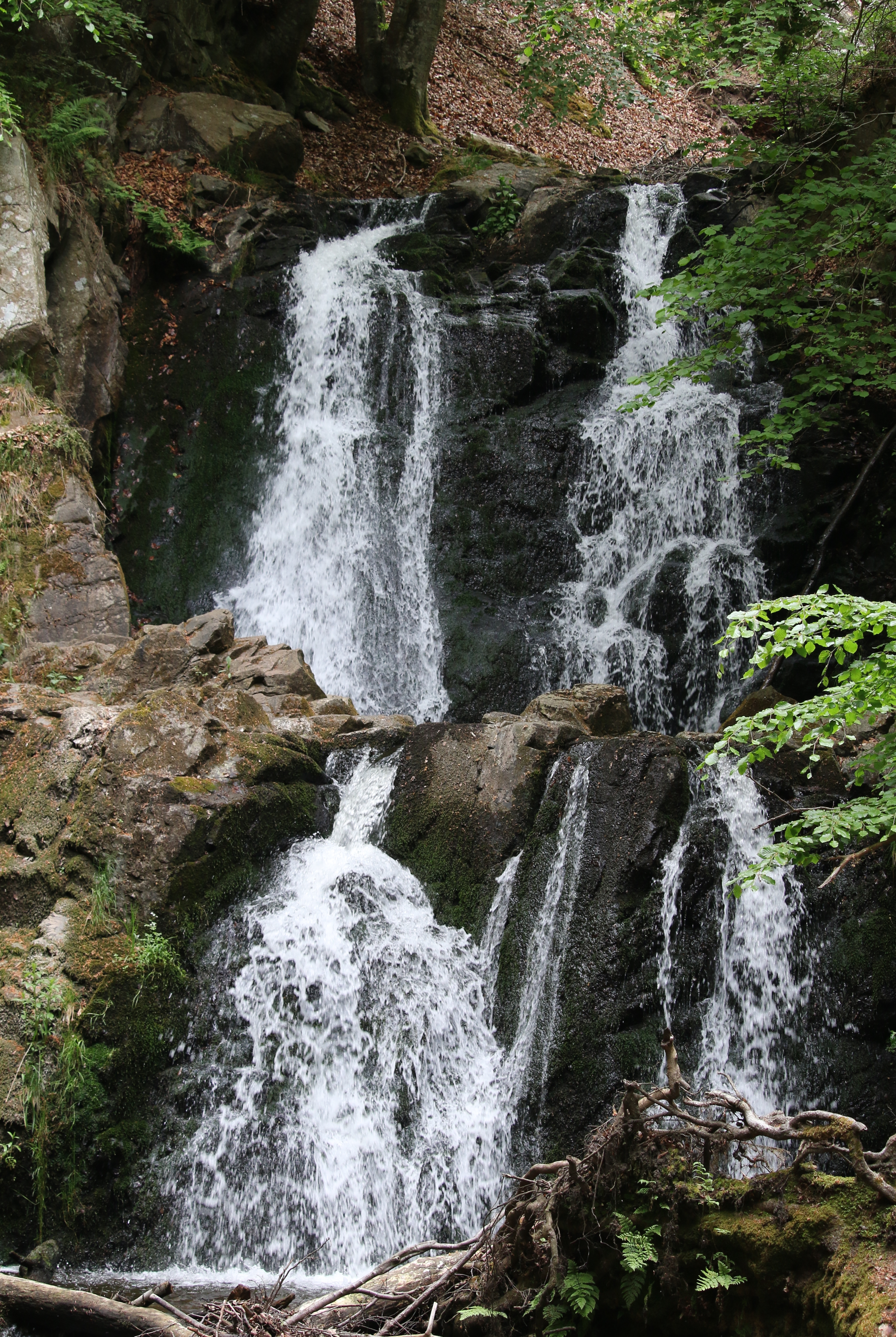 Forsakar från ravinen